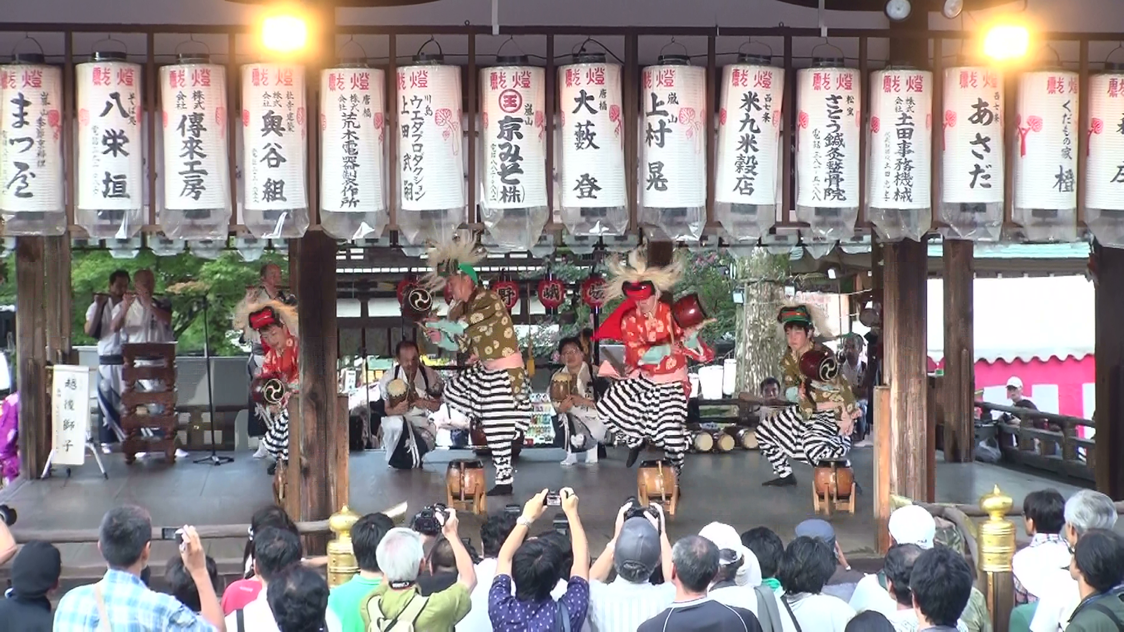 松尾大社での奉納